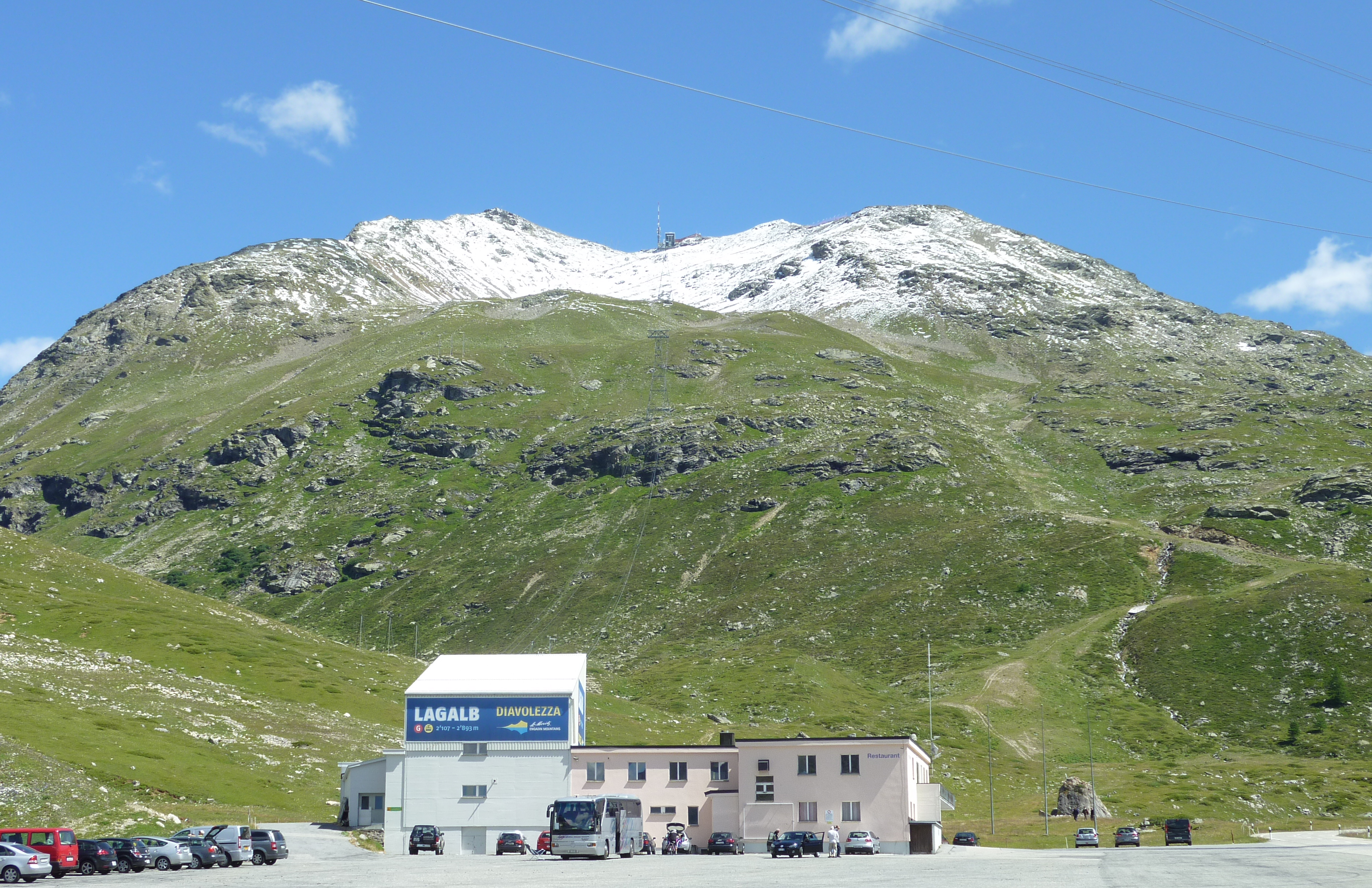 Piz Lagalb im Val Bernina